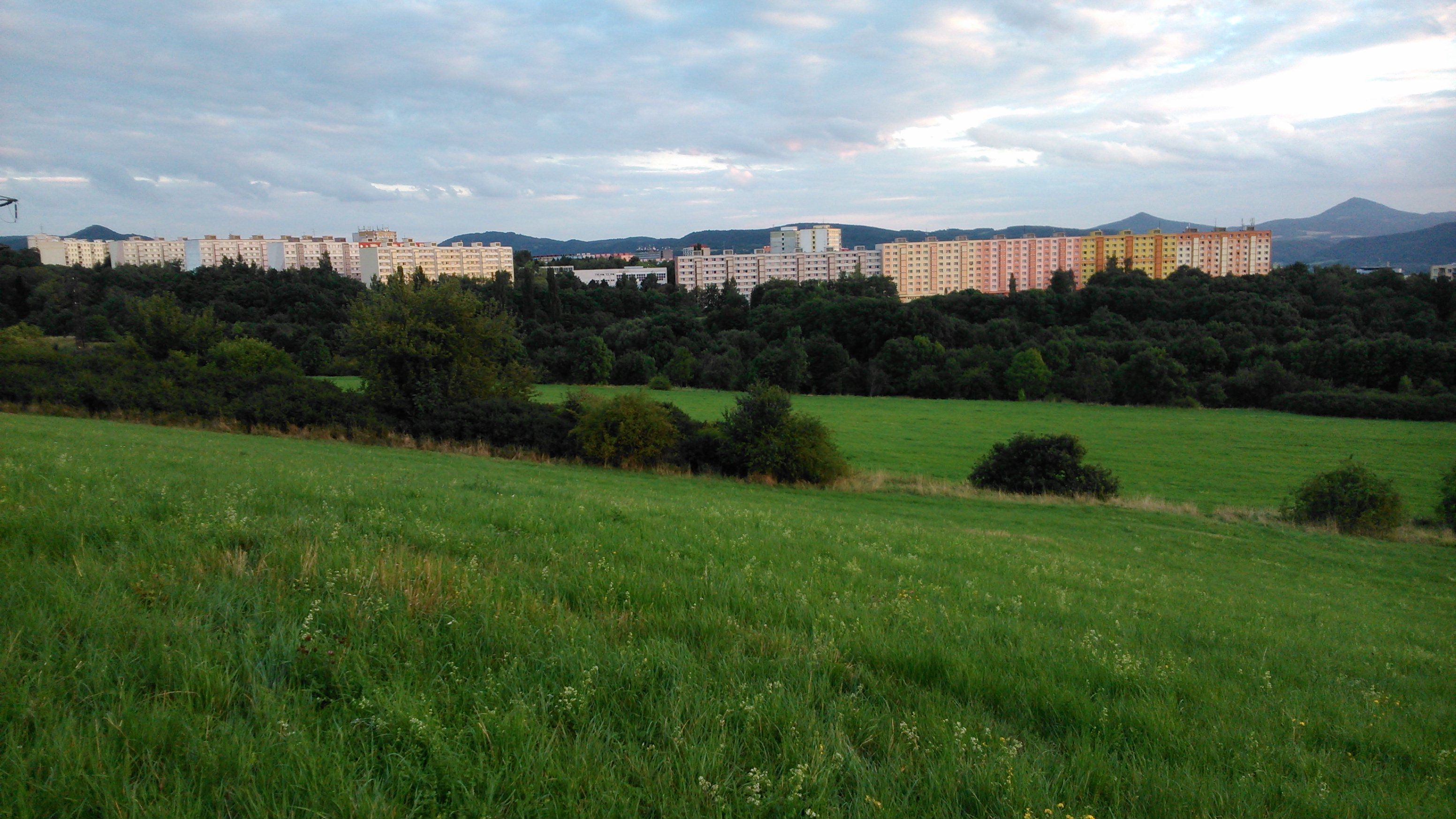 Pohled na sídliště Severní Terasa